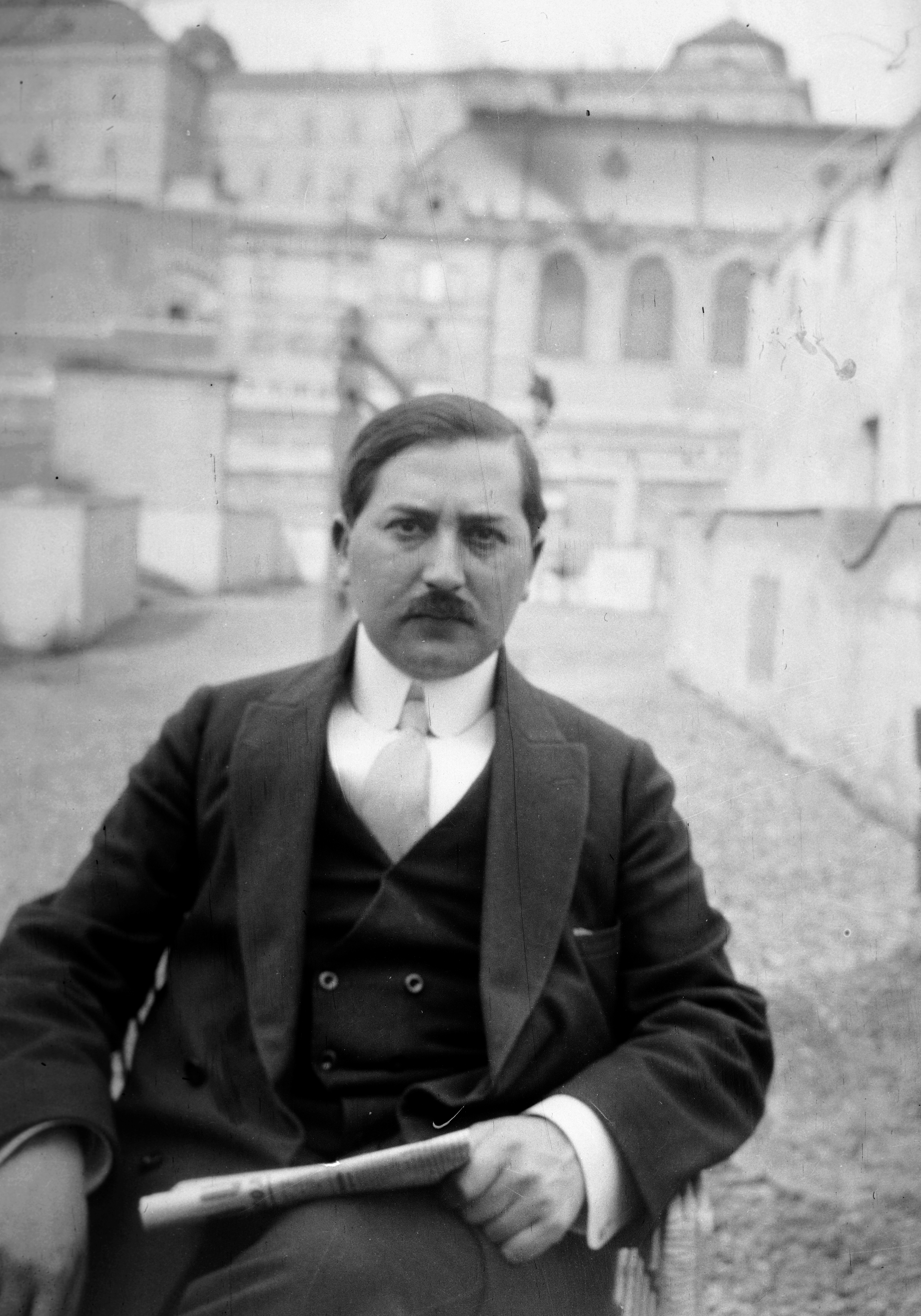 Attila út 35. (Attila körút 2.) tetőterasza, Lakatos Artúr festő és iparművész. Háttérben a Lovarda és Királyi Palota Istállóépülete. Location: Hungary, Budapest I. Tags: portrait, Budapest Title: Attila út 35. (Attila körút 2.) tetőterasza, Lakatos Artúr festő és iparművész. Háttérben a Lovarda és Királyi Palota Istállóépülete.